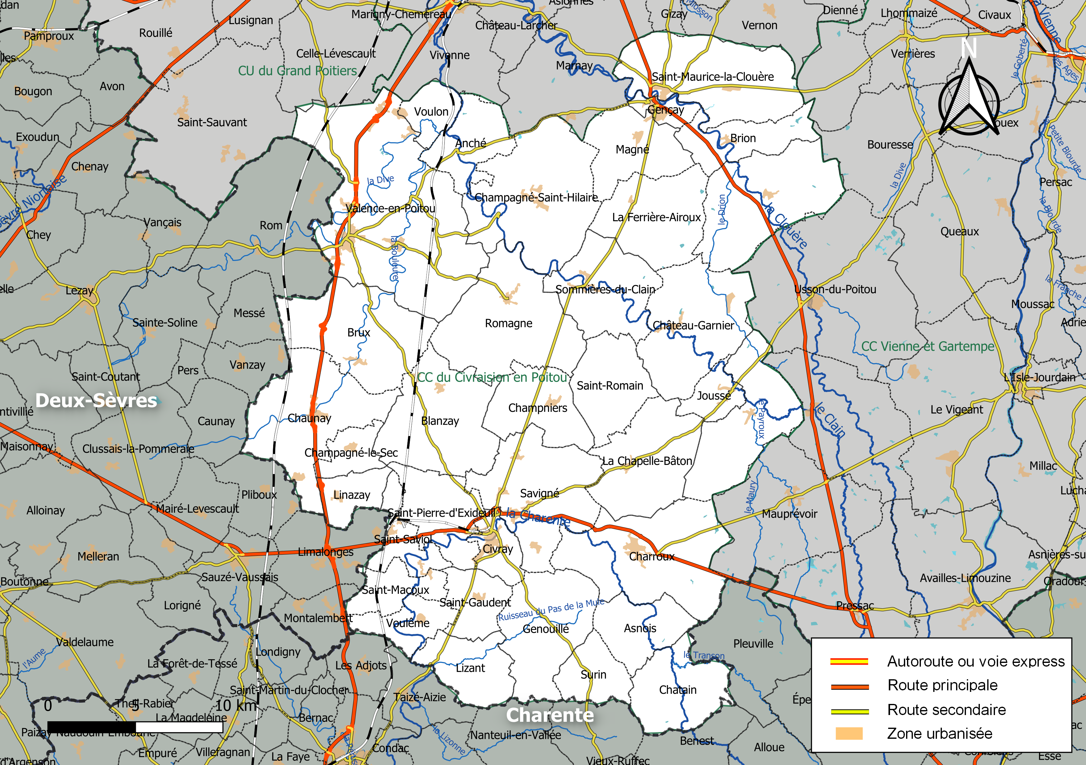 Carte géographique de la Communauté de communes du Civraisien en Poitou, département de la Vienne, France. Composition au 1er janvier 2019.